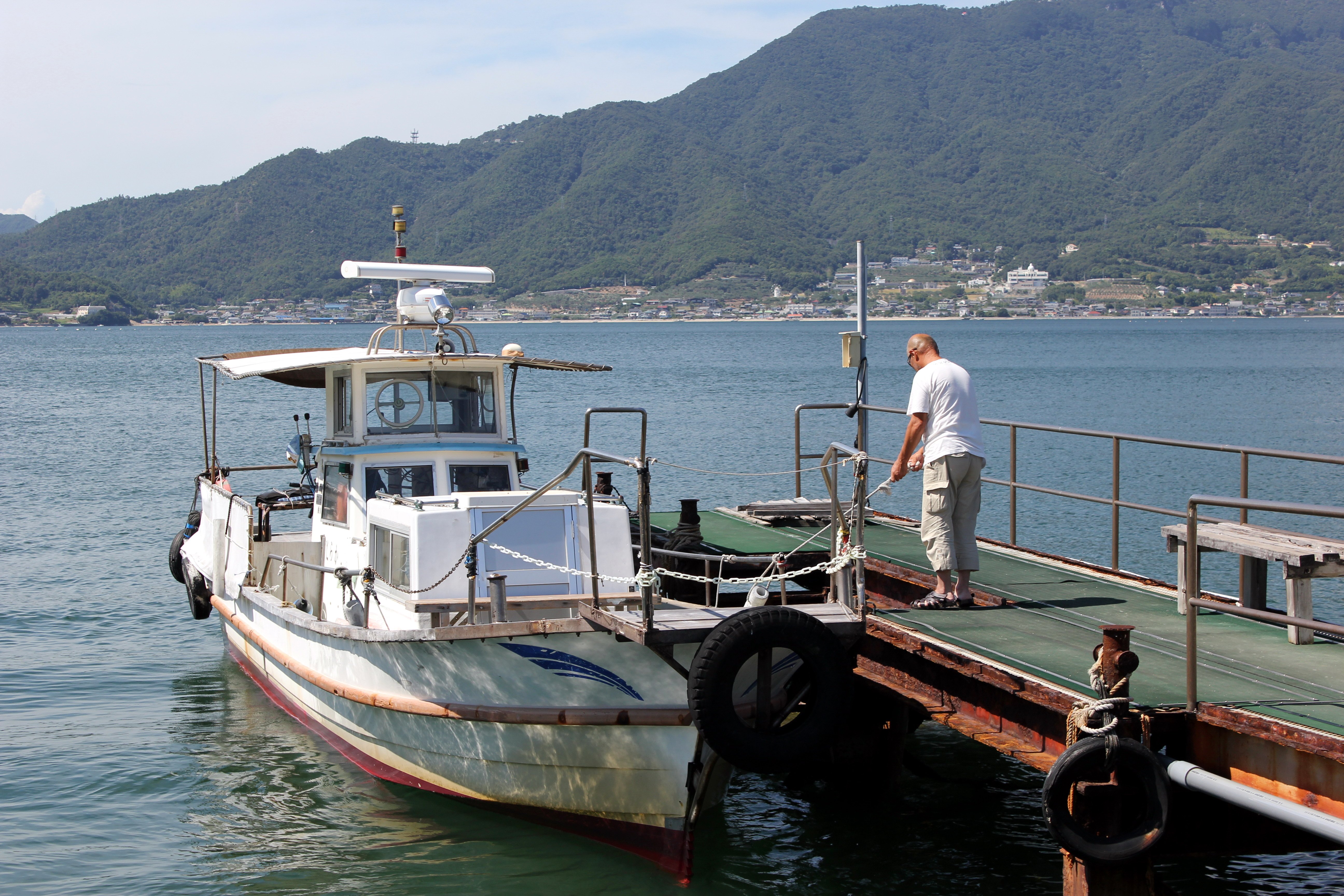 ２４の瞳映画村への渡し舟